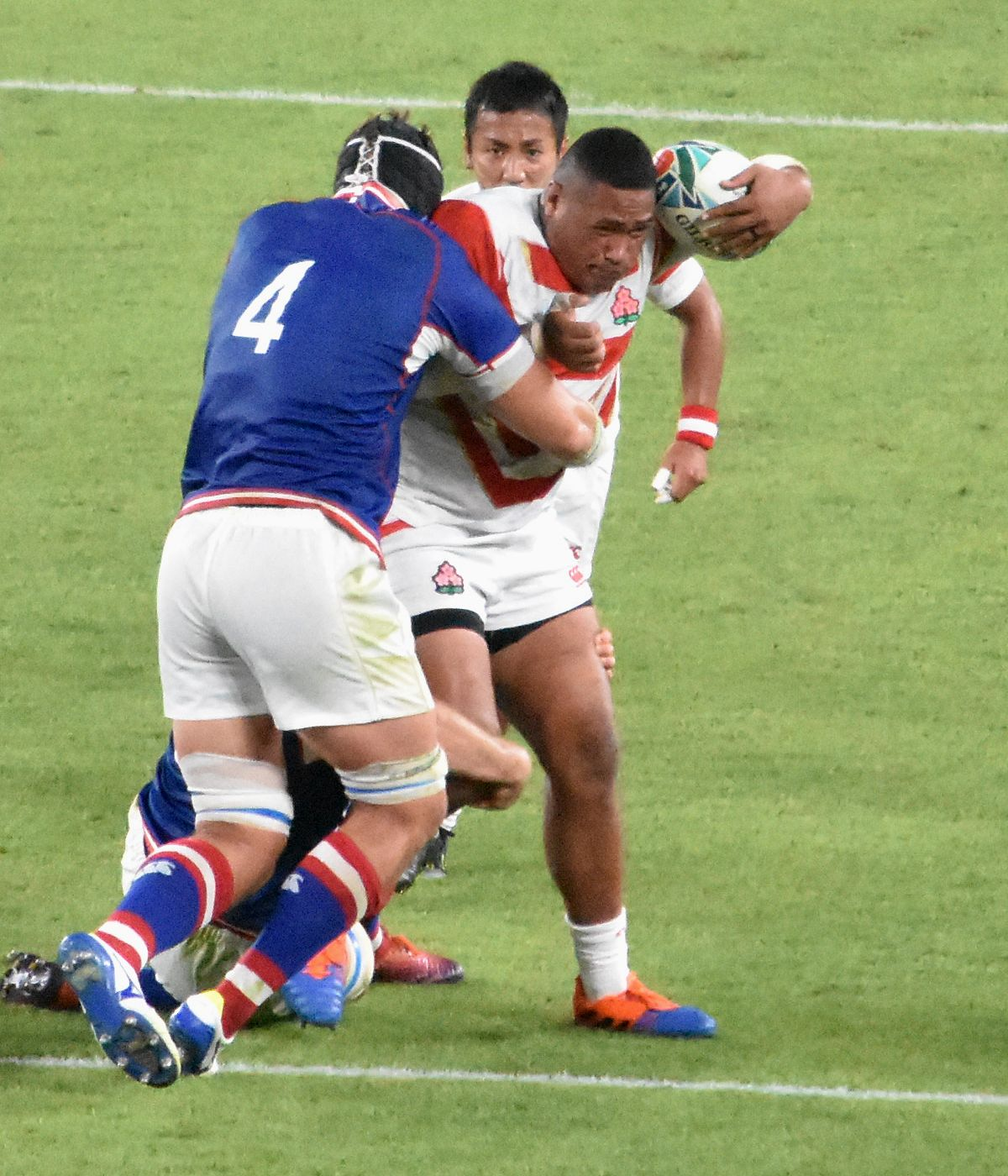 ヴァルアサエリ愛